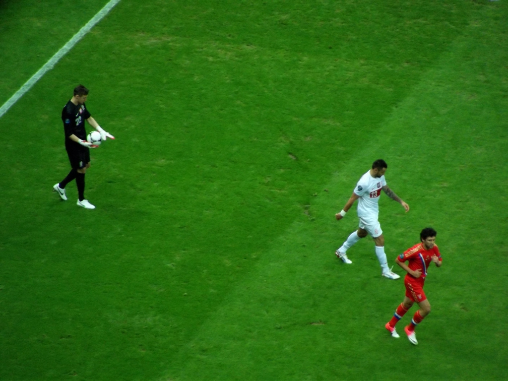 Zdjęcie zrobione w piątym dniu UEFA Euro 2012 w Warszawie, marszu rosyjskich kibiców i meczu Polska-Rosja.